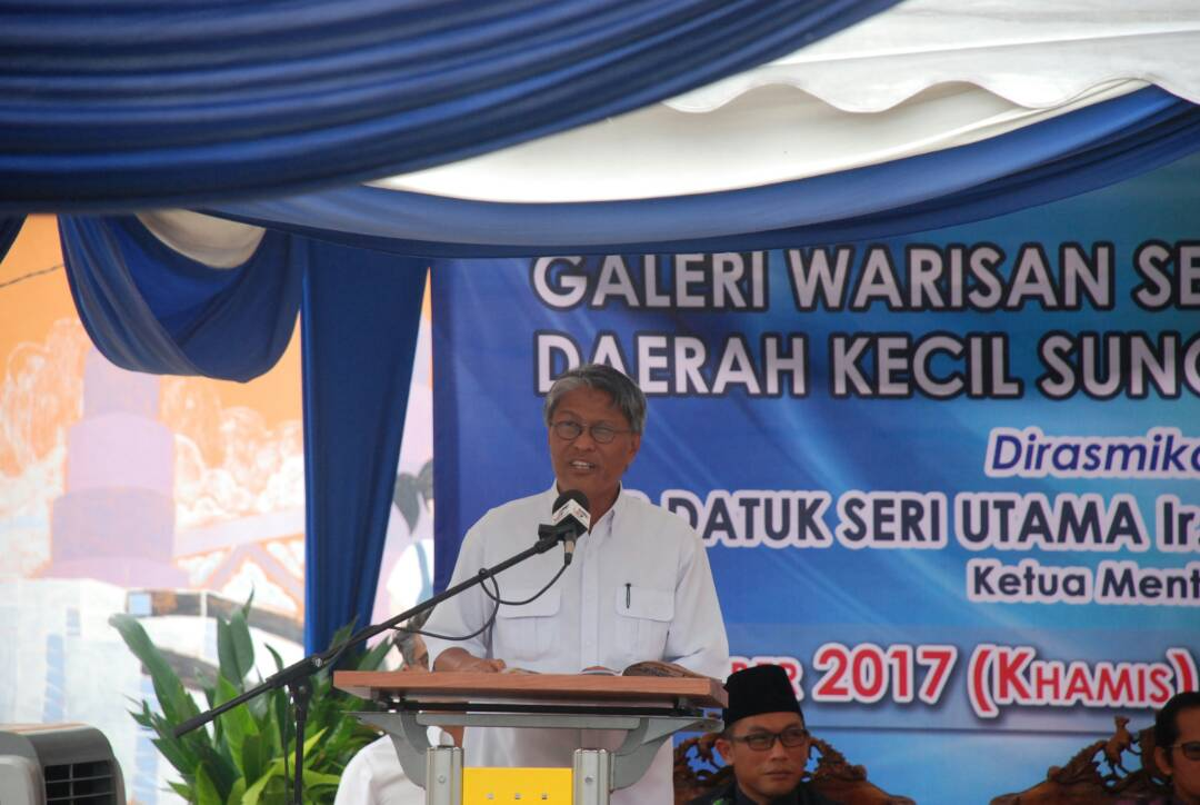 YB Datuk Hasan Bin Abdul Rahman, memberi ucapan dan seterusnya merasmikan Galeri Warisan Daerah Kecil Sungai Rambai